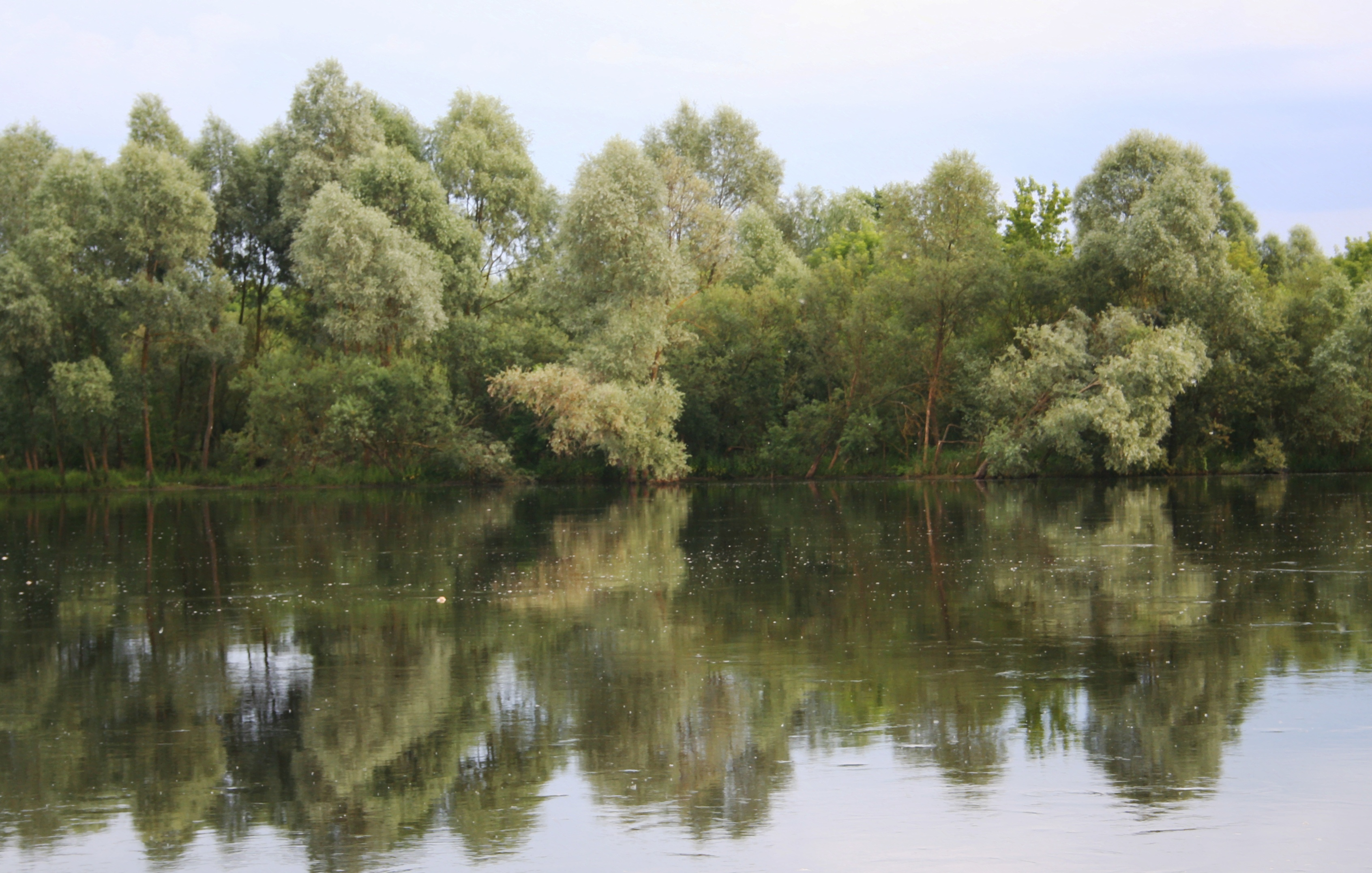 Bug przy miejscowości Niemirów, gmina Mielnik, woj. podlaskie. W tym rejonie Bug przestaje być rzeką graniczną między Polską a Białorusią.